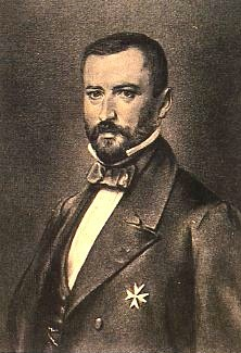 Friedrich Albrecht zu Eulenburg (1815-1881)